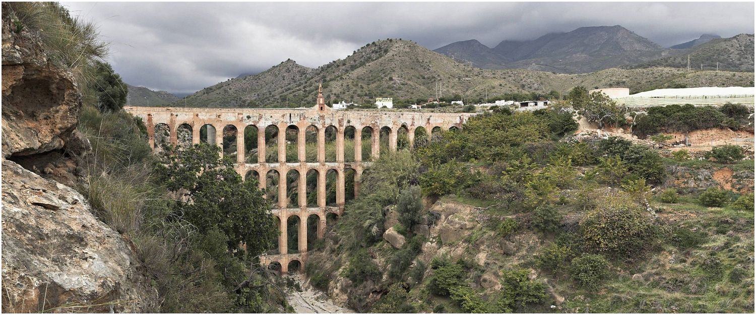 Spain, Nerja, Aqueduct